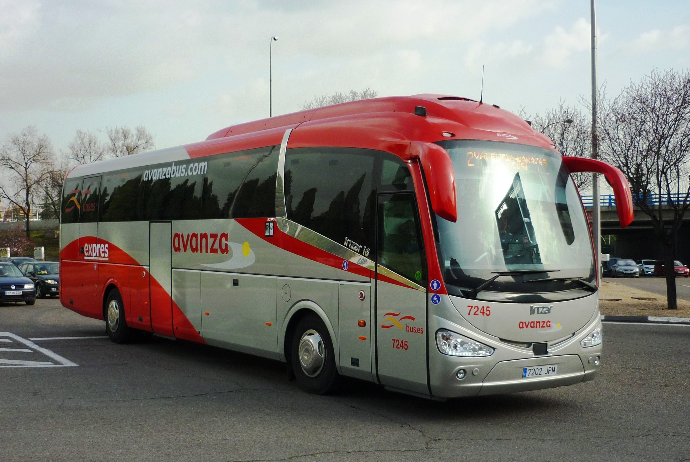 7245_ADO